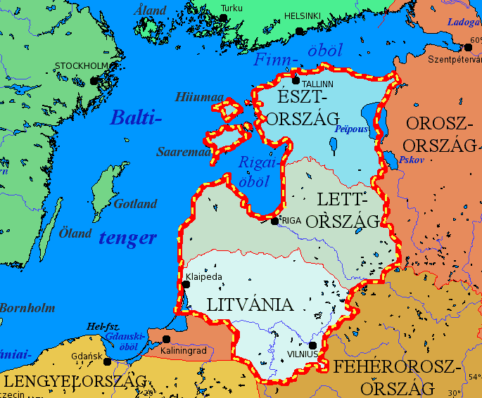 A Balti Államok, térkép